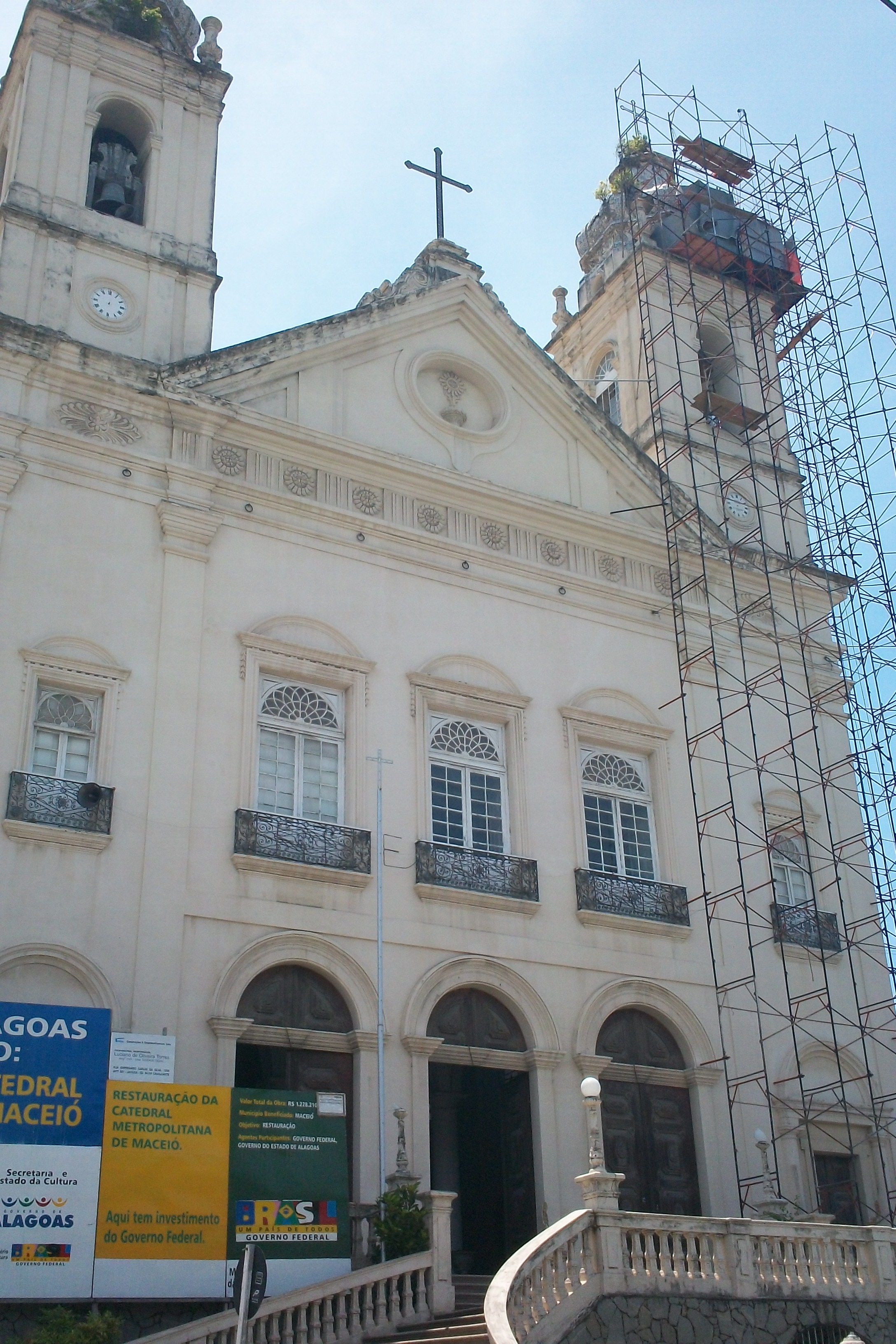 catedral metropolitana maceio